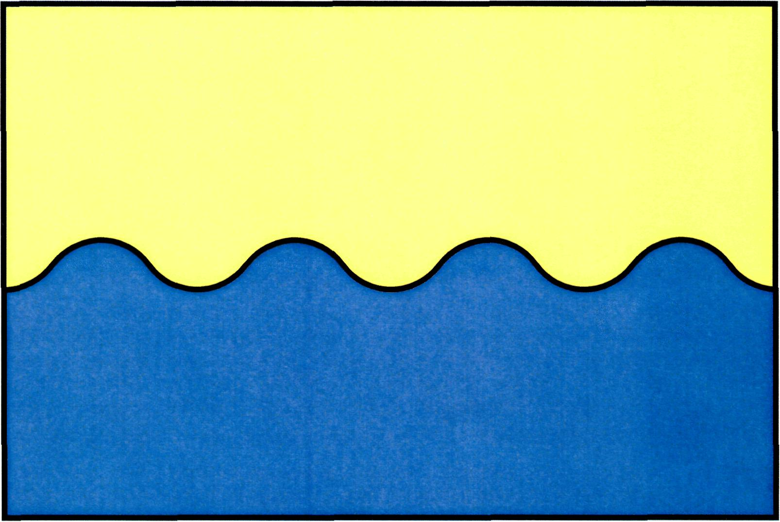 Vlajka obce Starý Kolín